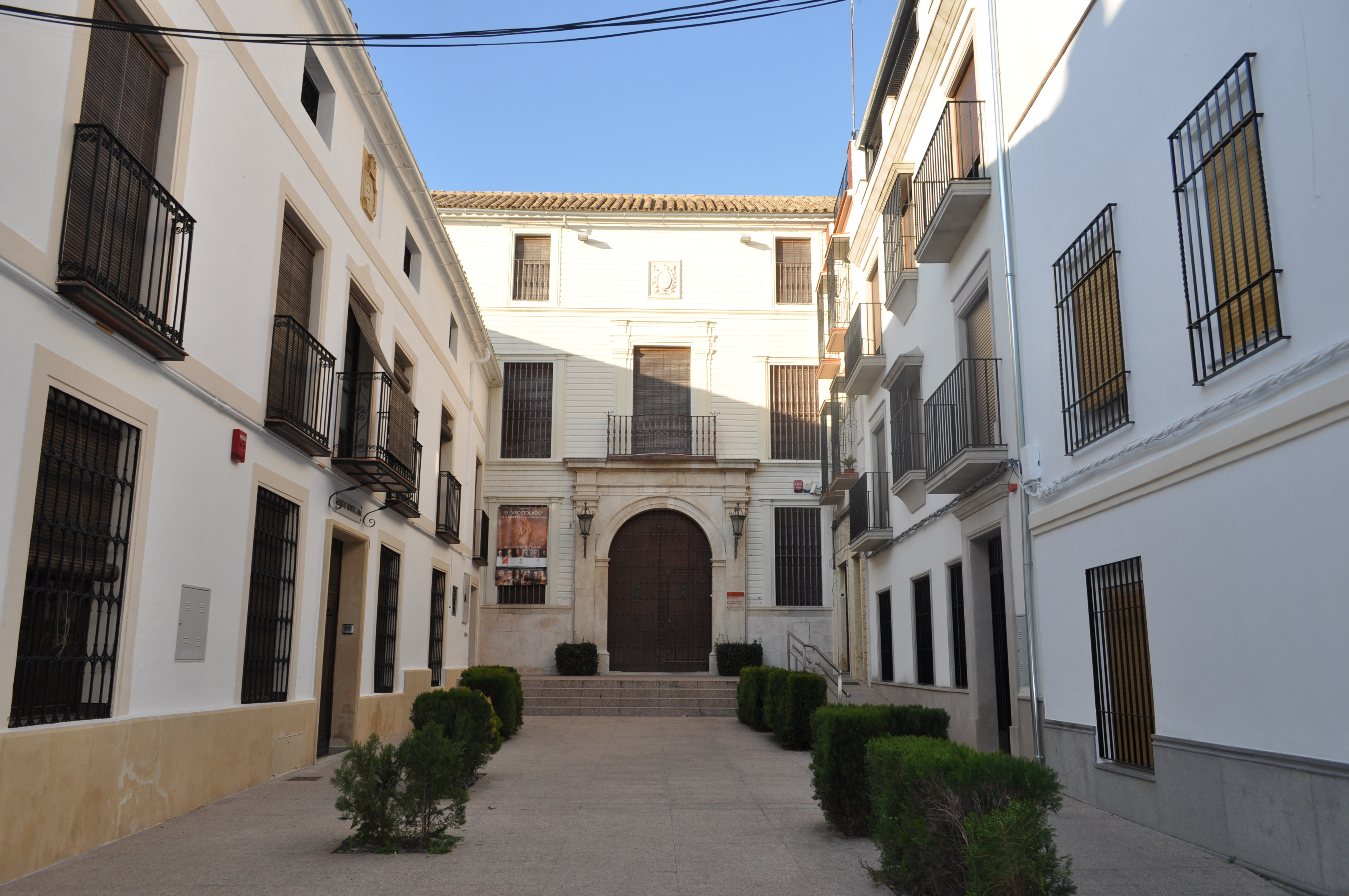 Casa de las Aguas, actual sede del Museo Garnelo de Montilla, el único dedicado a este pintor. Es, además, la sede de la Fundación Biblioteca Manuel Ruiz, una de las mayores bibliotecas de historia local de España.